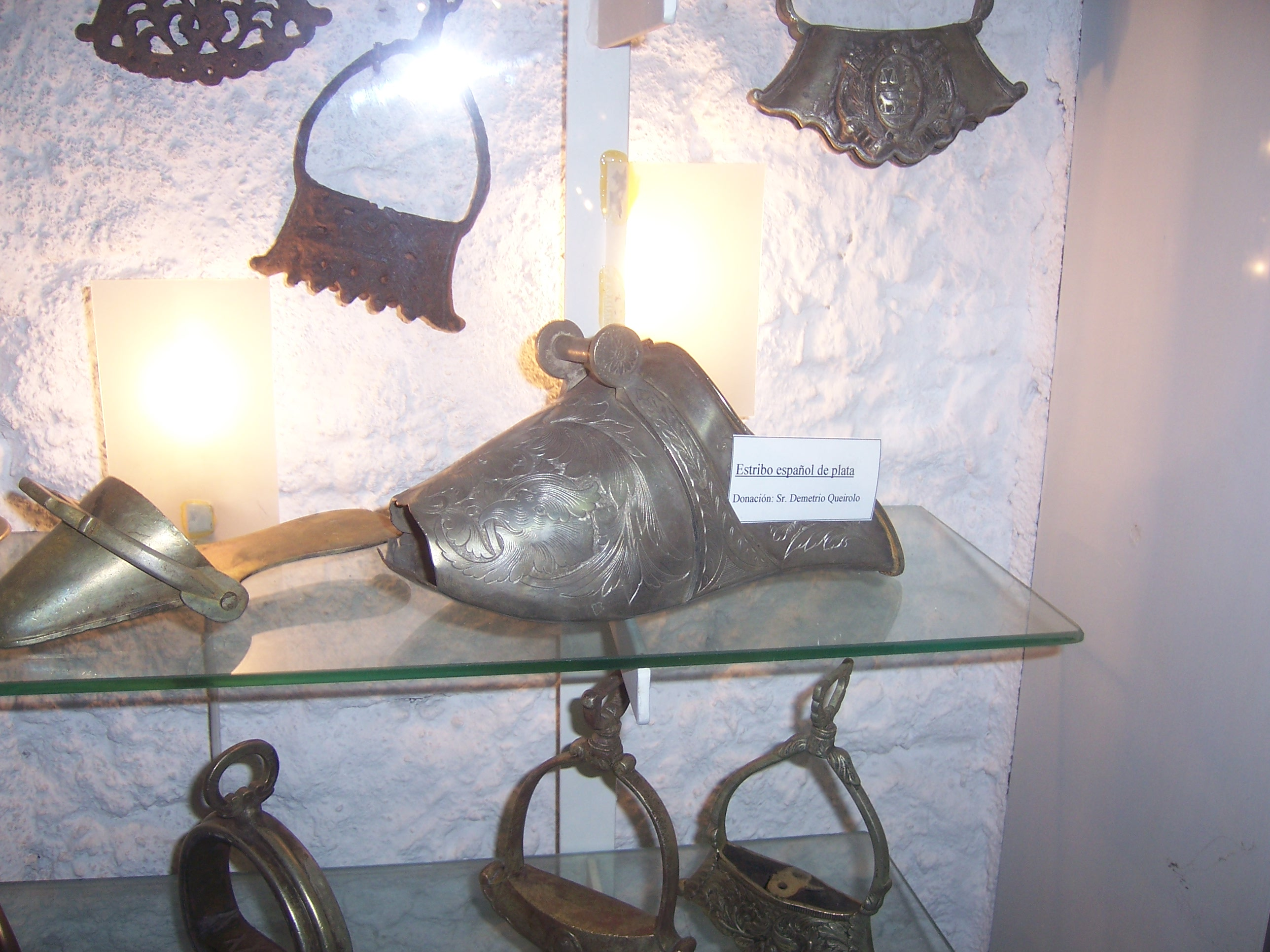 Estribos antiguos. La imagen corresponde al acervo depositado en el Museo del Indio Washington Escobar, sito en la ciudad de Tacuarembó, capital del departamento del mismo nombre.